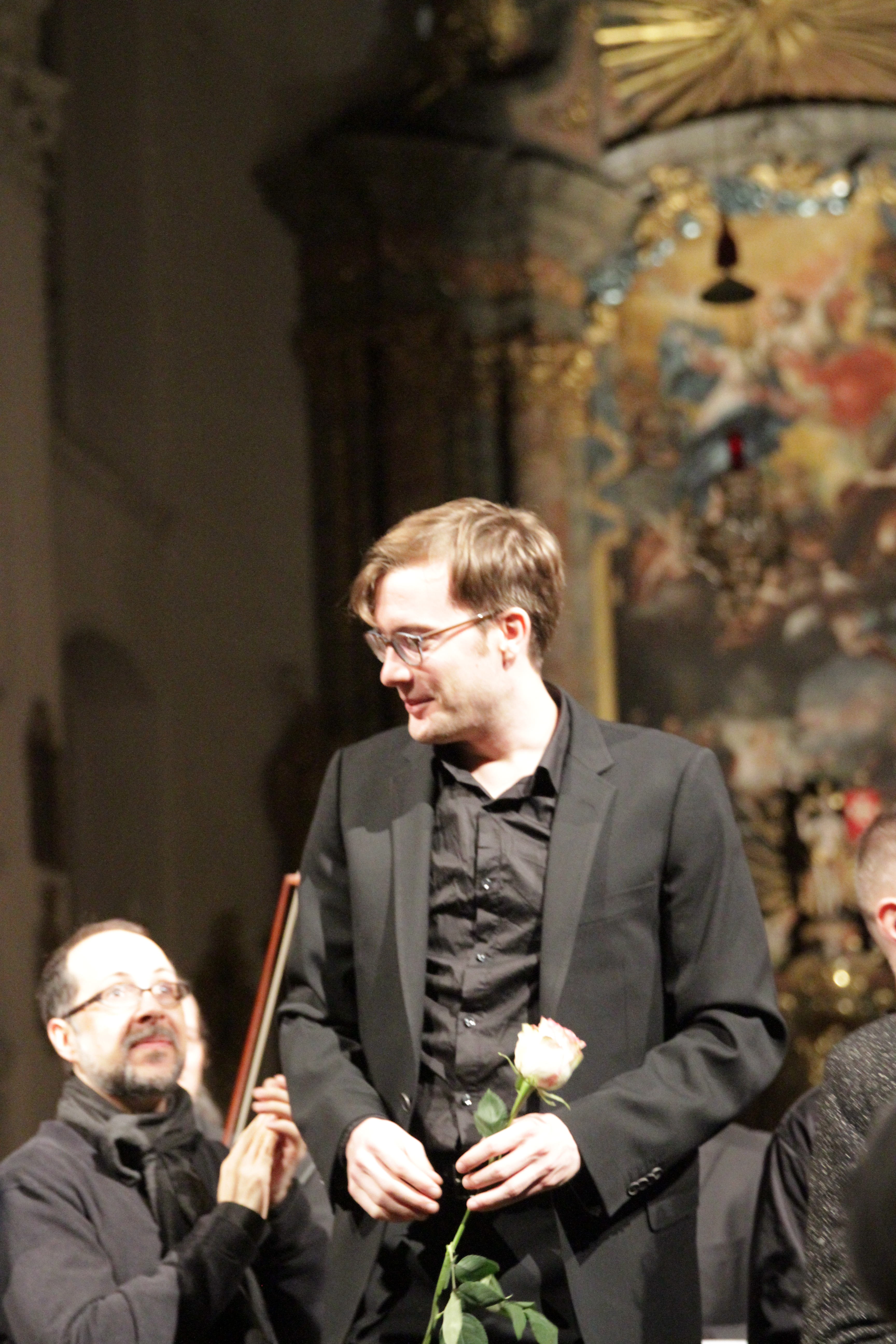 Tonspuren 2014 - Abschlusskonzert in der Klosterkirche Irsee. Dirigent Johannes X. Schachtner Festivalsommer This photo was created with the support of donations to Wikimedia Deutschland in the context of the CPB project "Festival Summer". This file is made available under the Creative Commons CC0 1.0 Universal Public Domain Dedication. The person who associated a work with this deed has dedicated the work to the public domain by waiving all of their rights to the work worldwide under copyright law, including all related and neighboring rights, to the extent allowed by law. You can copy, modify, distribute and perform the work, even for commercial purposes, all without asking permission. Thomas Springer Personality rights warningAlthough this work is freely licensed or in the public domain, the person(s) shown may have rights that legally restrict certain re-uses unless those depicted consent to such uses. In these cases, a model release or other evidence of consent could protect you from infringement claims.